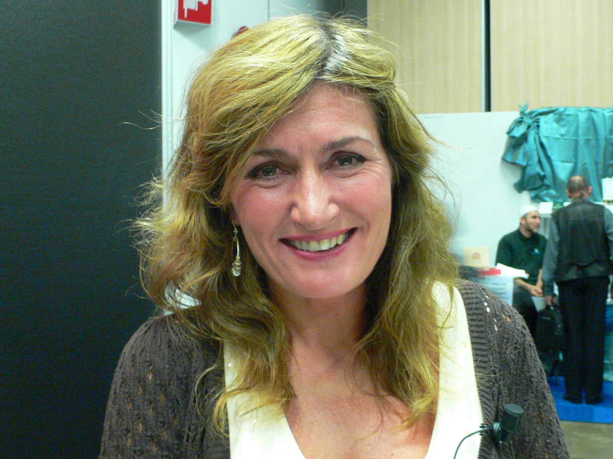 Mari Jungstedt at Gothenburg Book Fair 2007, Mari Jungstedt på Bok- och biblioteksmässan 2007